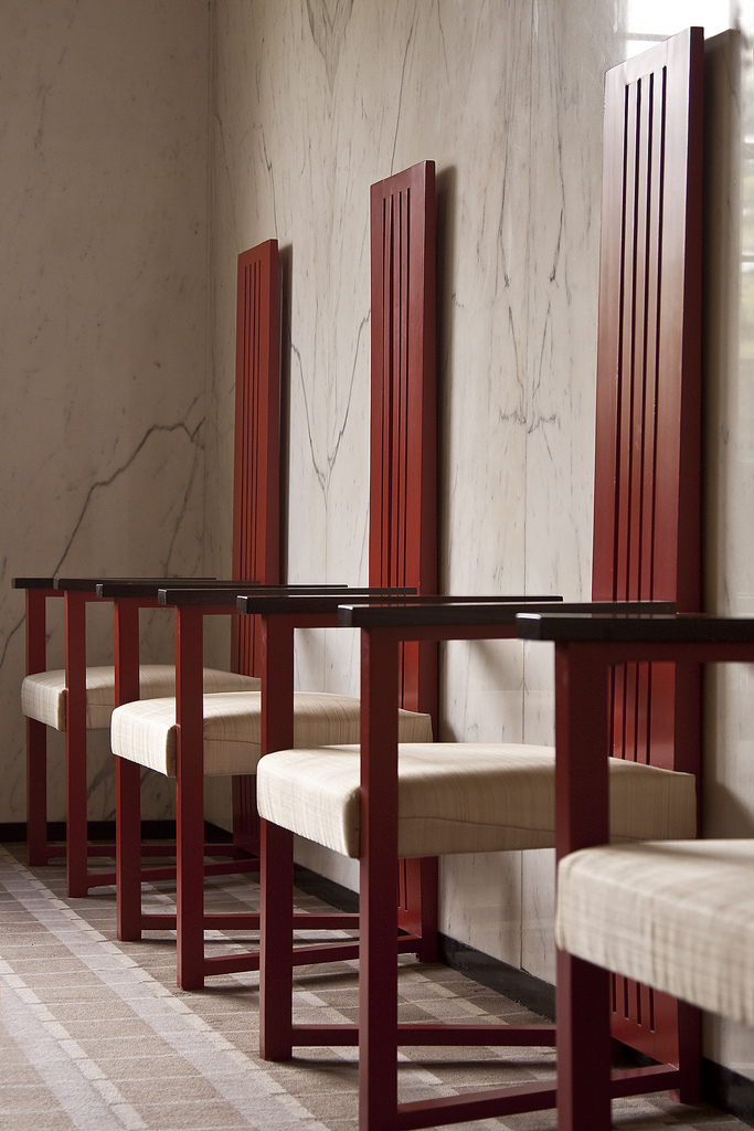 Beambtezetel, Trouwkamer, Firma van der Heide, Hilversum beambtezetels